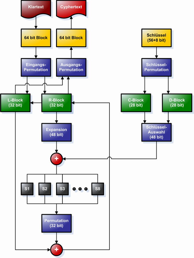 DES Ablauf